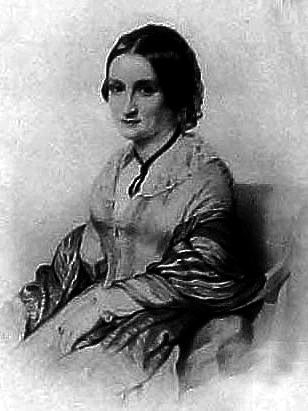 Fanny Fidgor verh. Wittgenstein sw